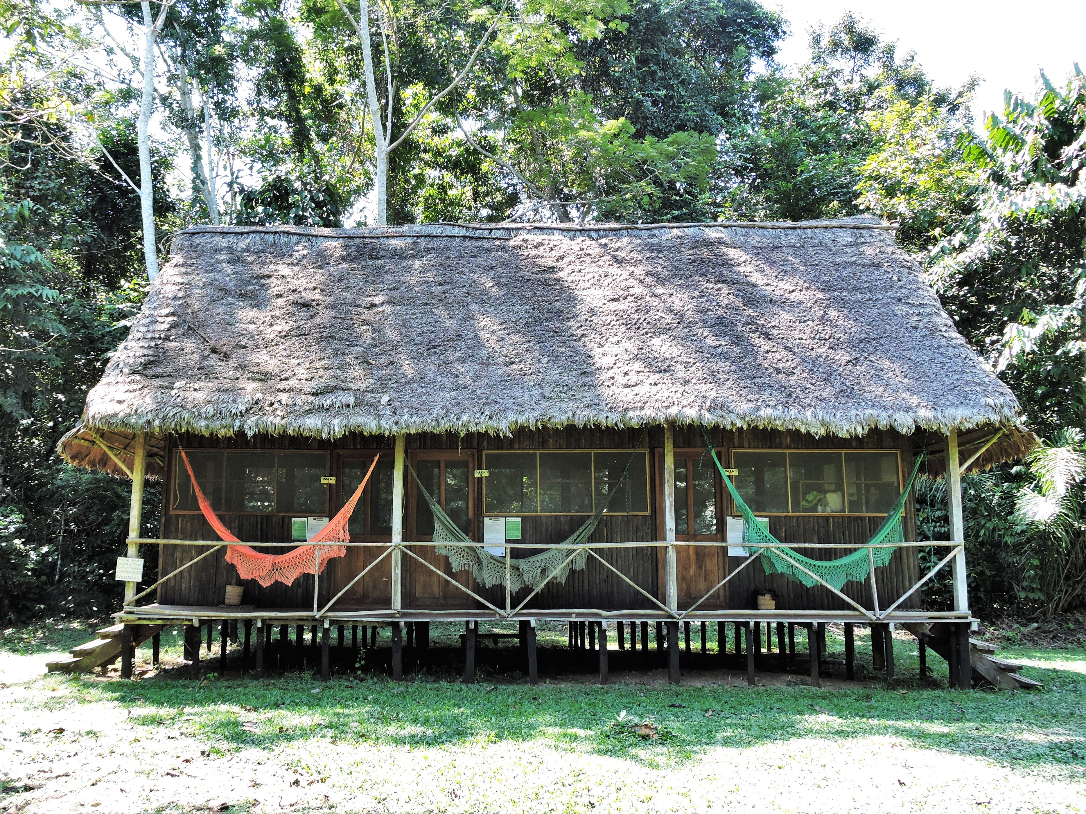 Cabaña con techo de Jatata. Parque Nacional Madidi, Bolivia (Chalalán).